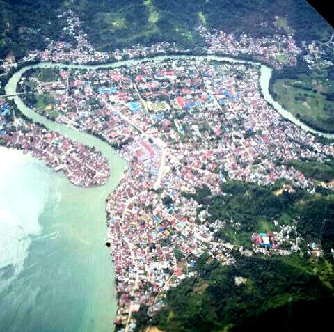 Pemandangan Kota Poso dari udara. Foto ini diambil pada tahun 2015.